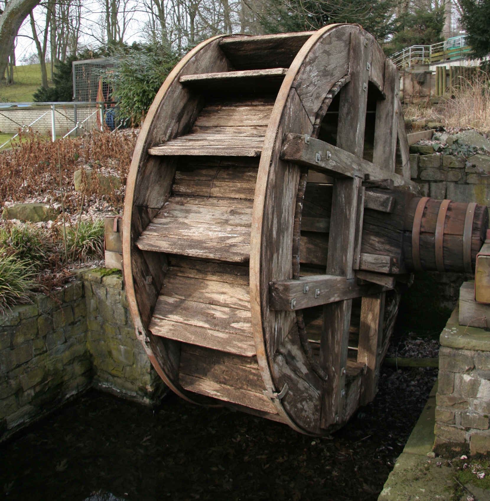 Deutschland, Dortmund, Westfalenpark, Buschmühle, altes Mühlrad